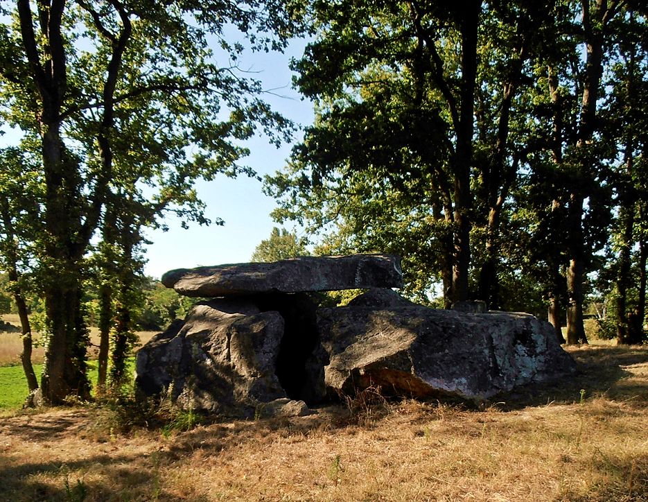 Dolmen de l’Etiau